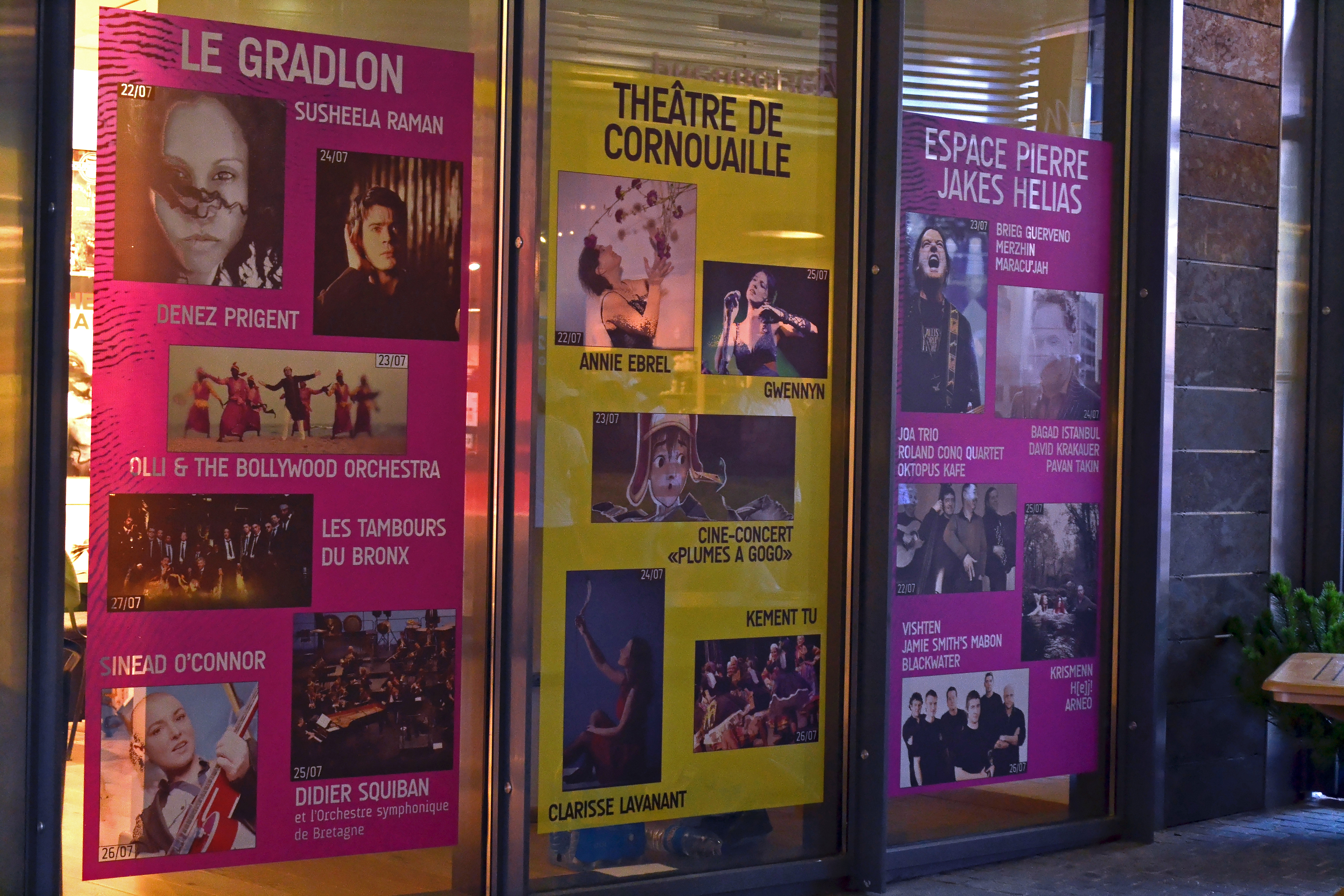 Billetterie du festival de Cornouaille 2014 (du 22 au 27 juillet), située à la galerie du Chapeau rouge.